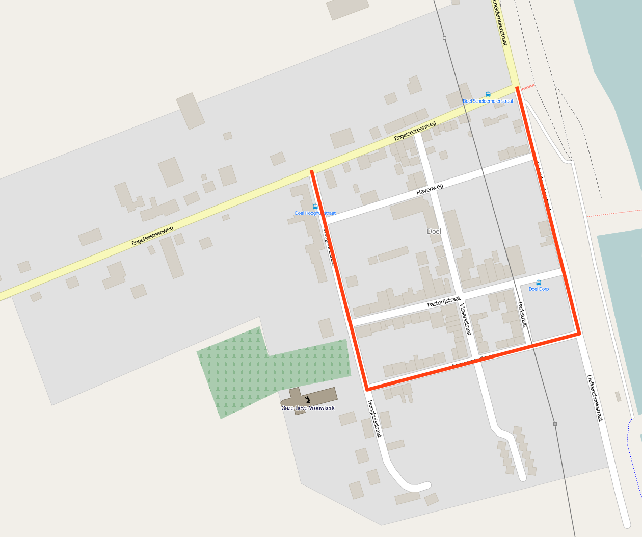 De N451a in Doel, Oost-Vlaanderen, België. De weg is in het rood aangegeven. This map may be incomplete, and may contain errors. Don't rely solely on it for navigation.